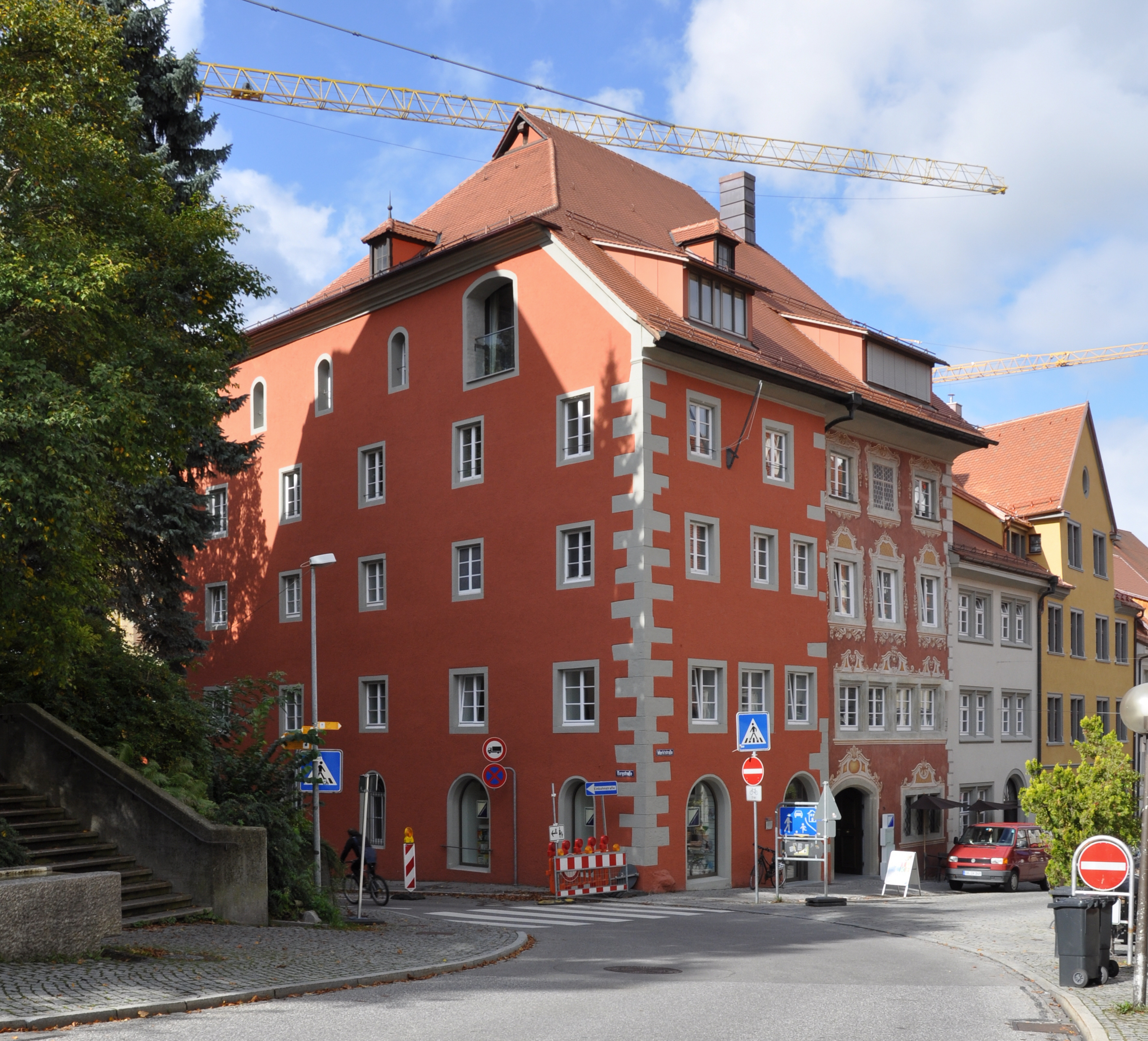 Ravensburg, Marktstraße 26 (Museum Ravensburger)